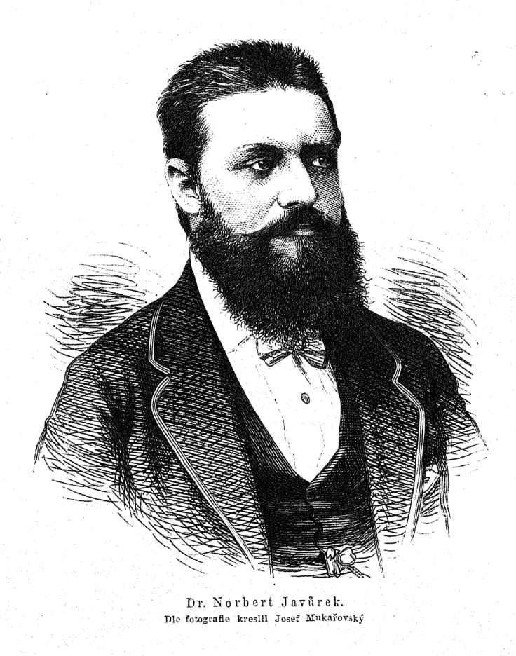 Norbert Javůrek (1839-1880), moravský lékař a hudební skladatel